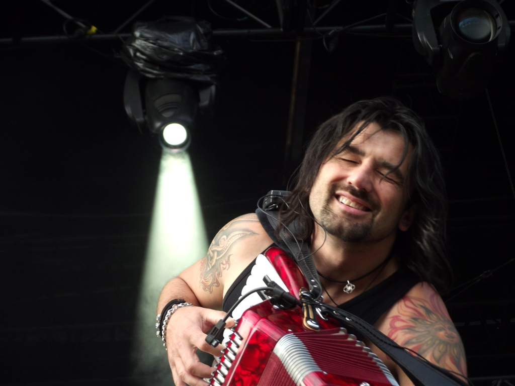 Zdjęcie zrobione podczas drugiego dnia Life Festivalu 2013 w Oświęcimiu.